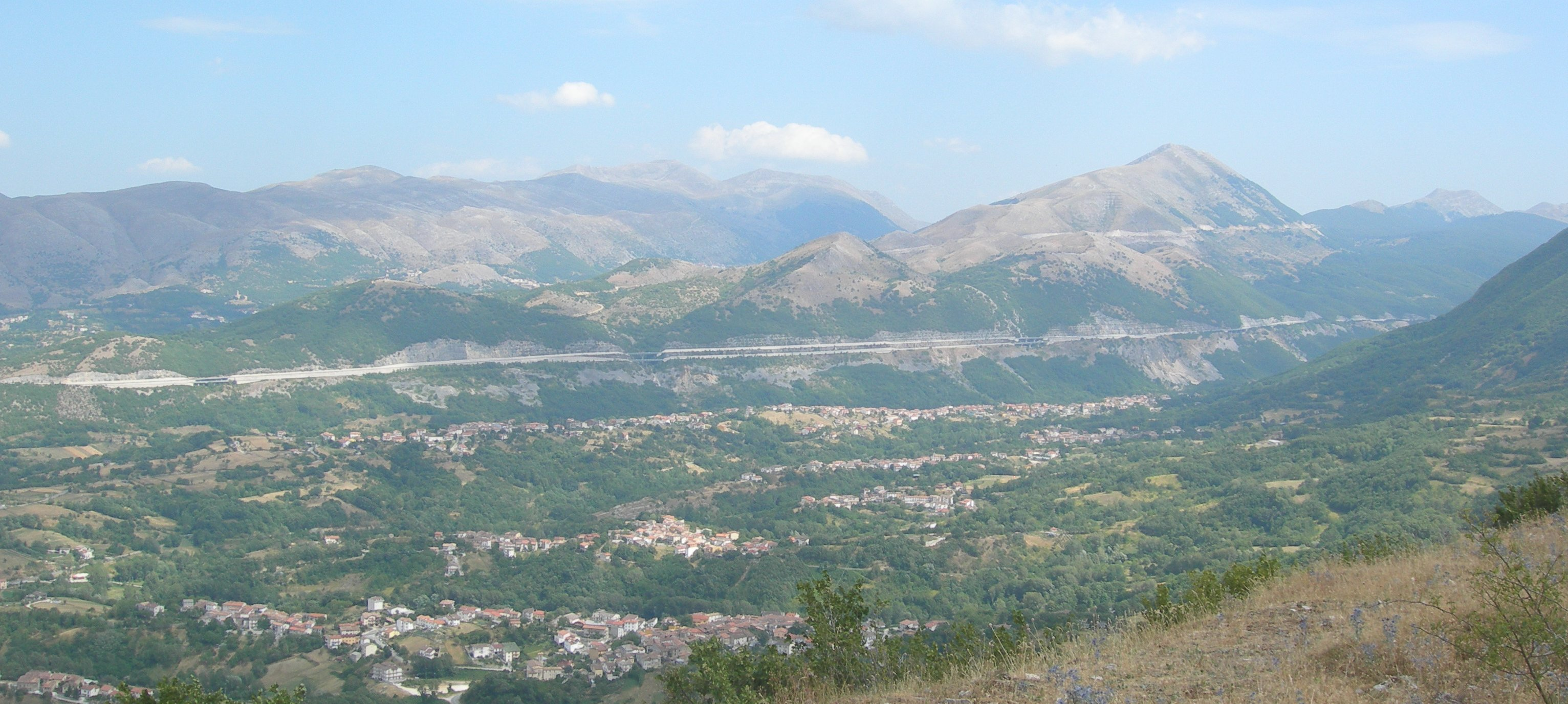 La vallata di Tornimparte vista da Castiglione